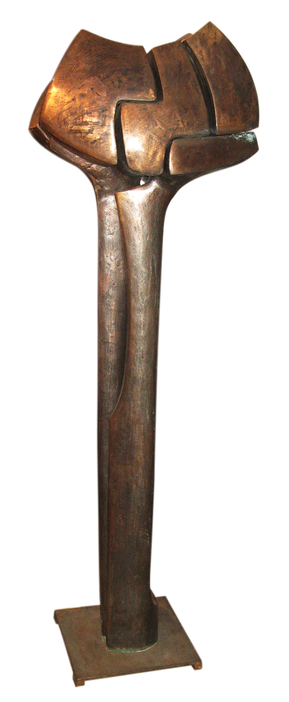 Formes debout numéro 9 sculpture en bronze d'1,80 mètre de haut